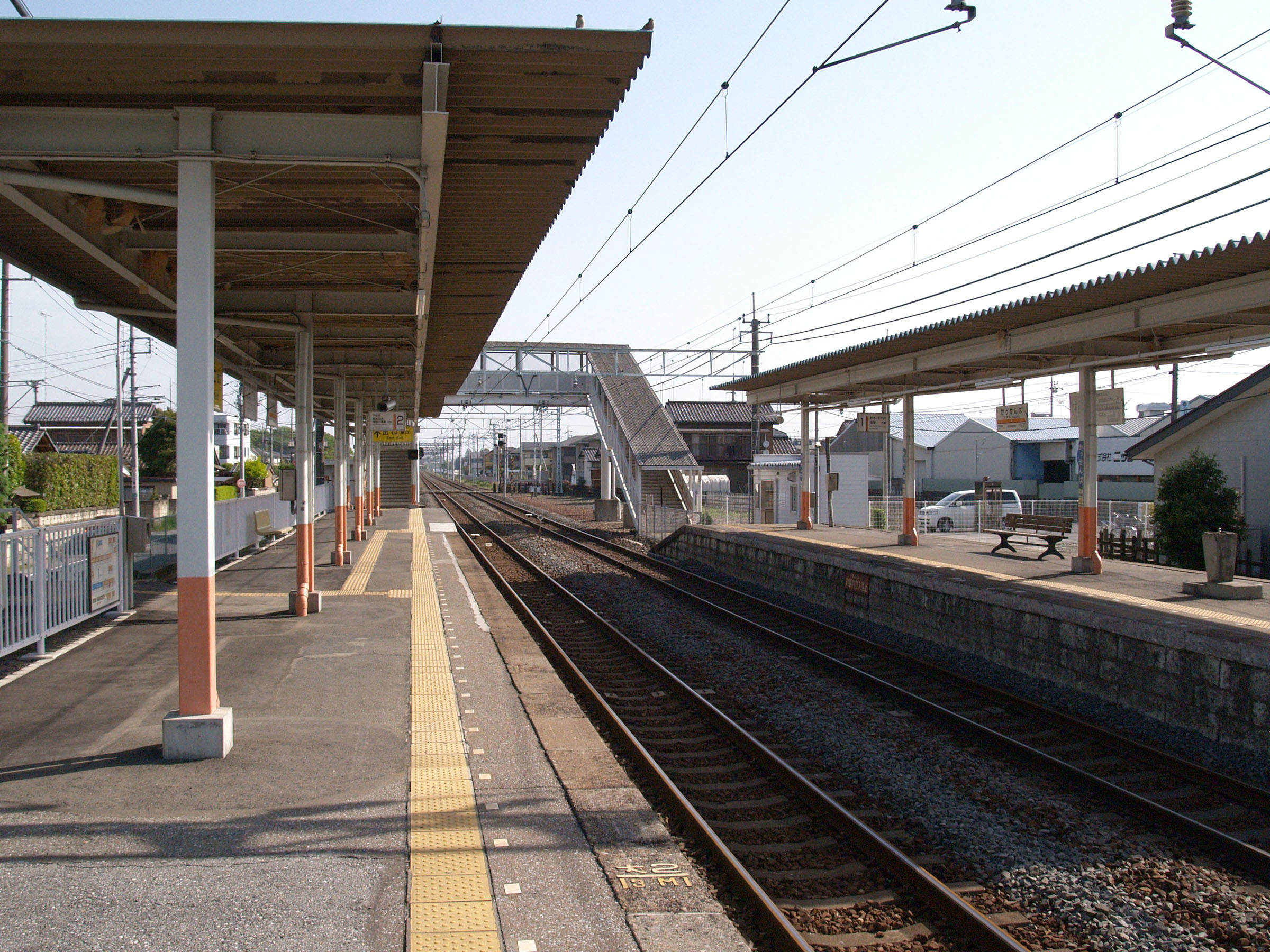 合戦場駅ホーム